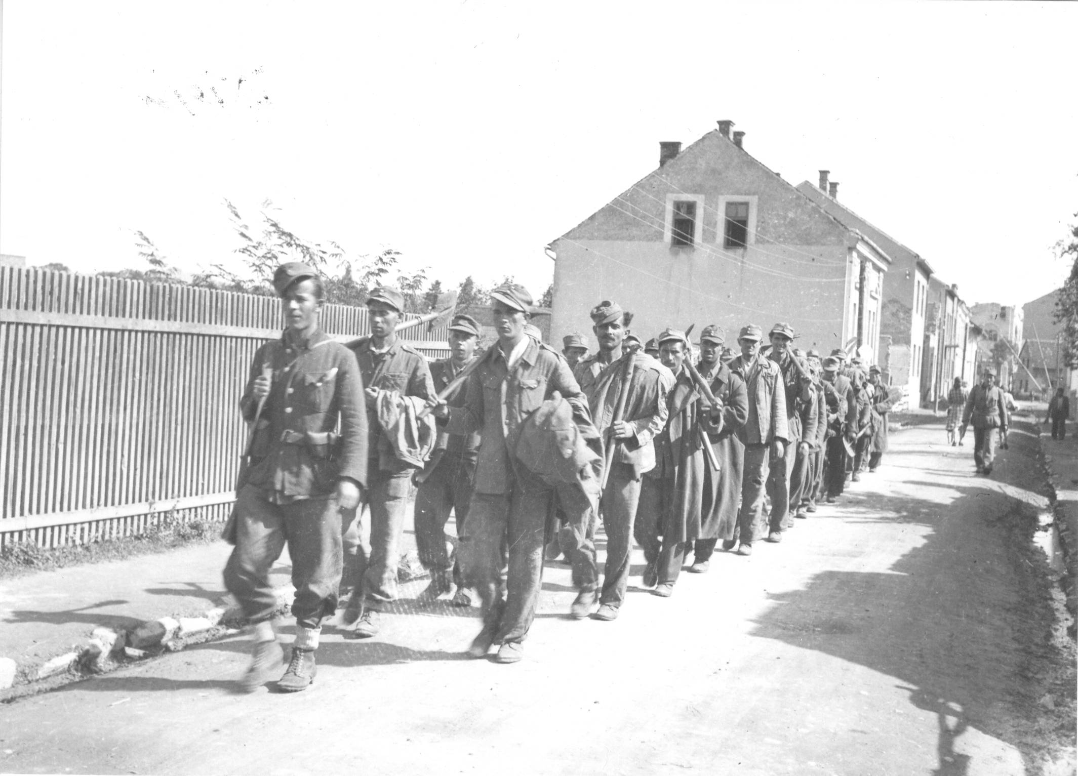 Zarobljeni domobrani u Banjaluci septembra 1944.